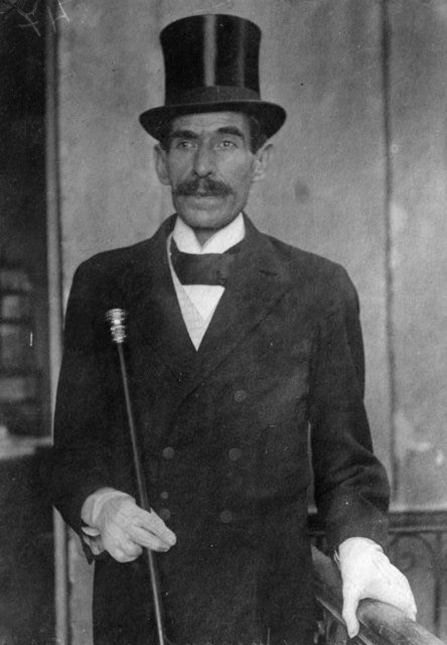 Retrato de Nicolás Zuñiga y Miranda, político mexicano que se presentó varias veces a la presidencia del país a finales del siglo XIX e inicios del XX. La imágen es parte del Archivo Casasola.